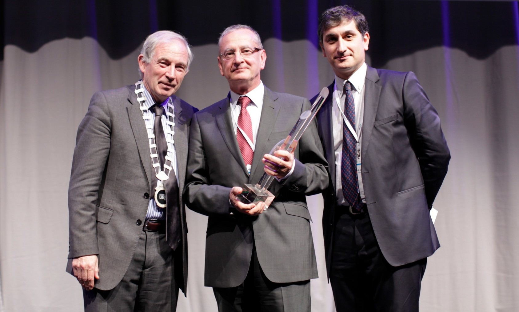 Remise du prix "Lifetime Achievement Award" de l’United European Gastroenterology en 2012 au Professeur Jean-Paul Galmiche